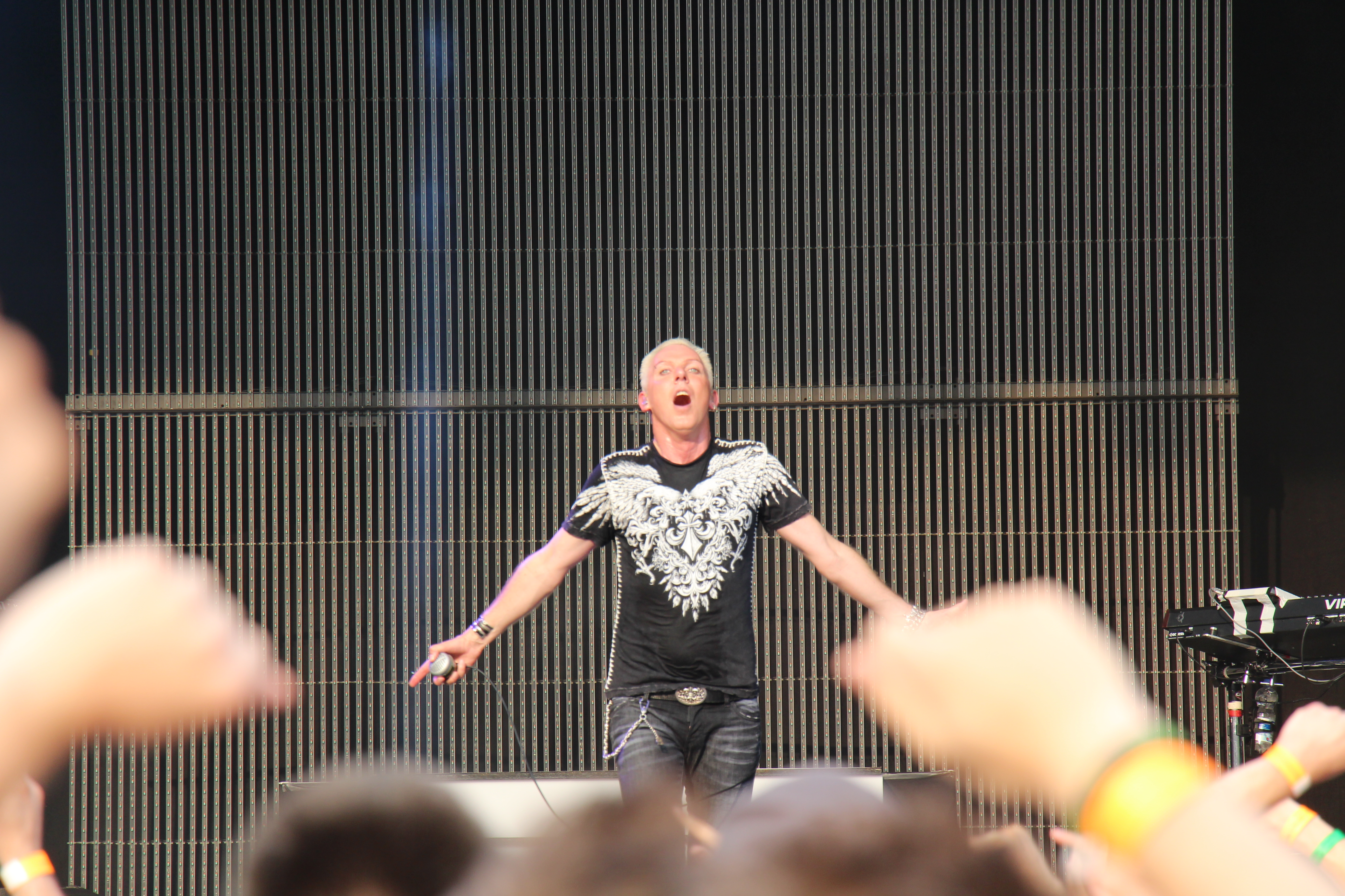 Scooter beim Sommernachtstraum 2013 in München beim Olympiapark